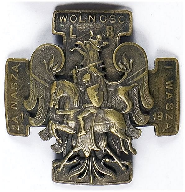 Odznaka Dywizji Litewsko-Białoruskiej, 1919 AD